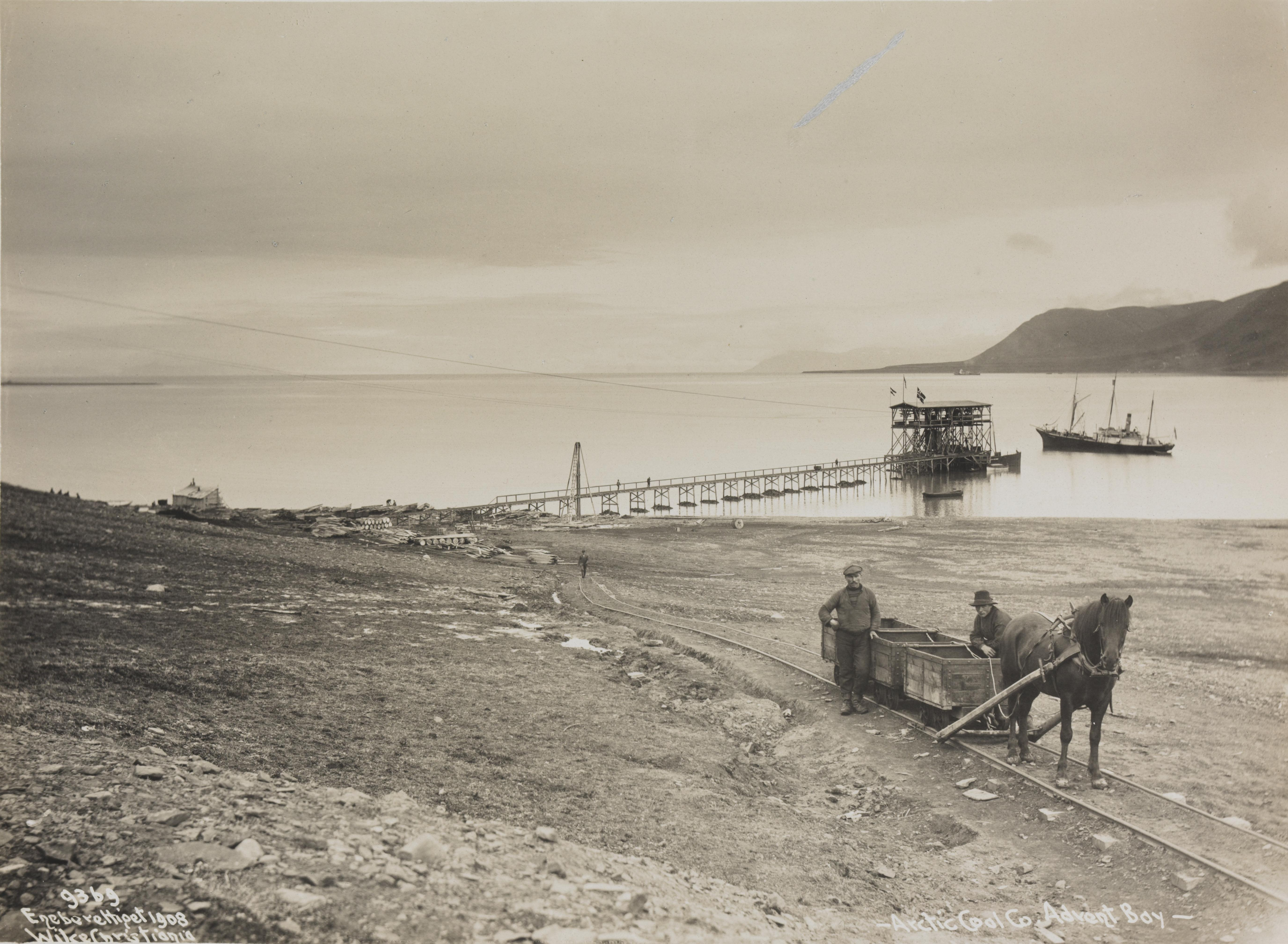 Bildet er hentet fra Nasjonalbibliotekets bildesamling. Anmerkninger til bildet var: Tittelen er fra fotografiets forside. Samme skip som på GH13alb_L02 Adventfjorden